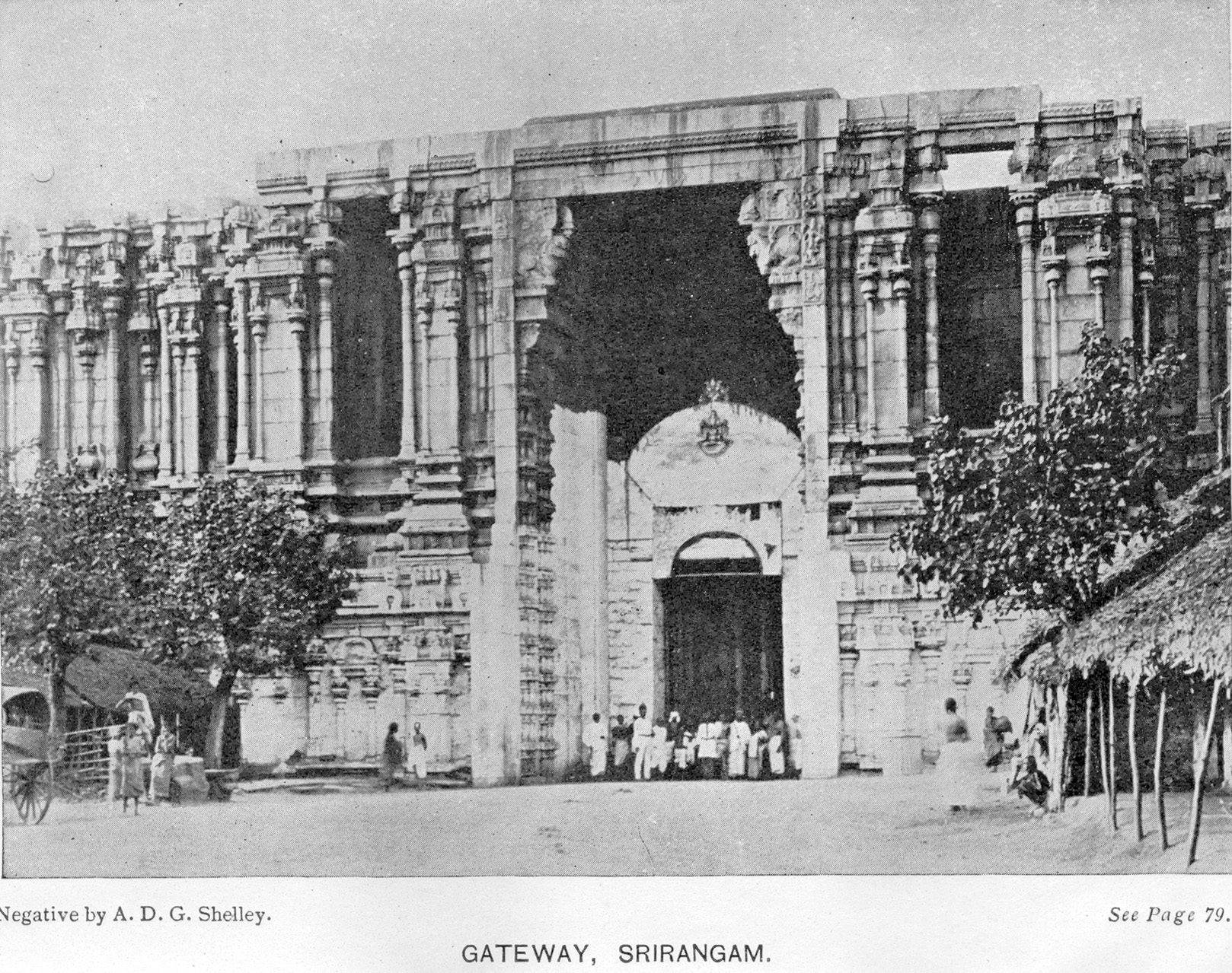 Sirirangam Gateway